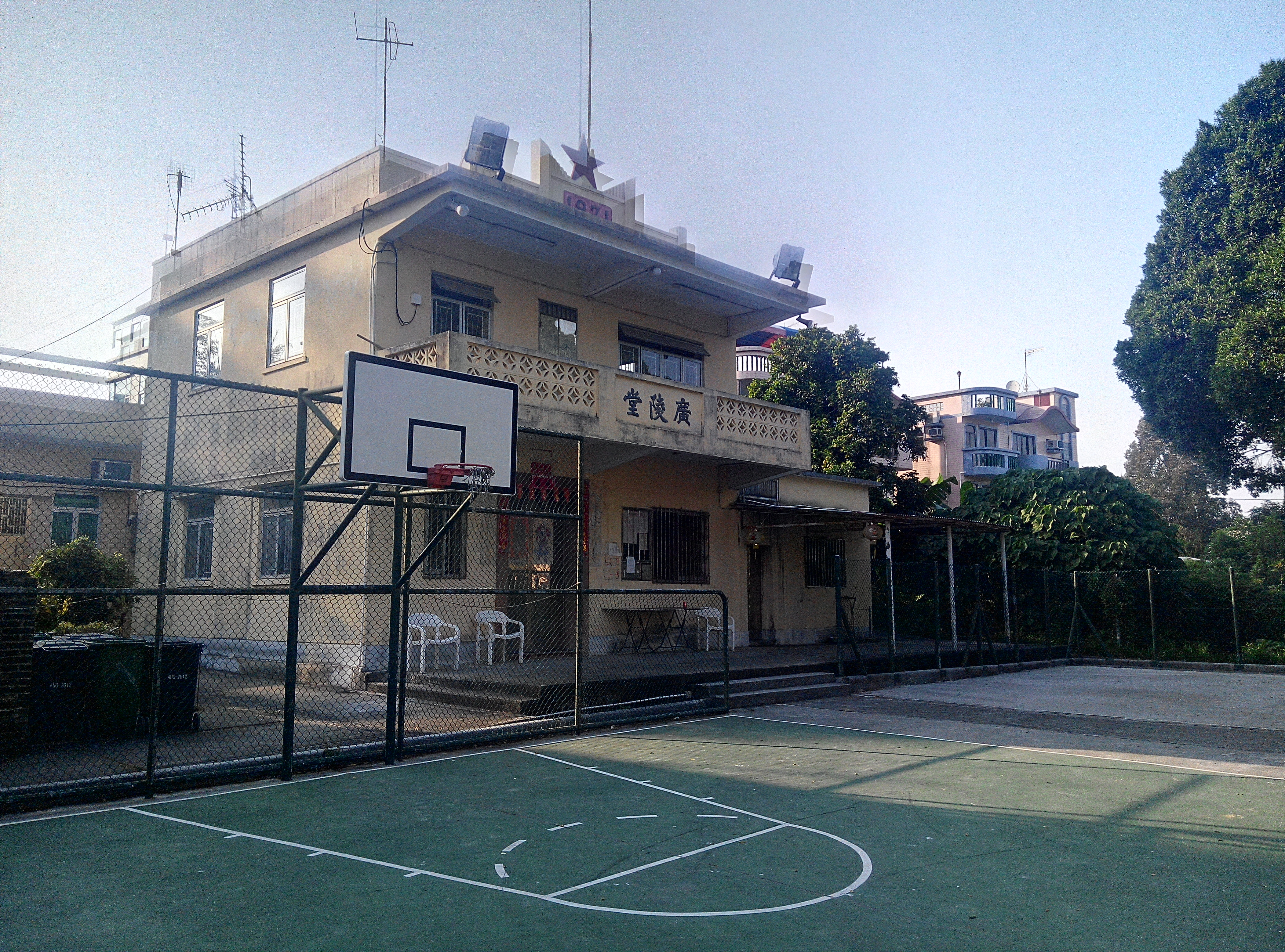 横洲盛屋村廣陵堂